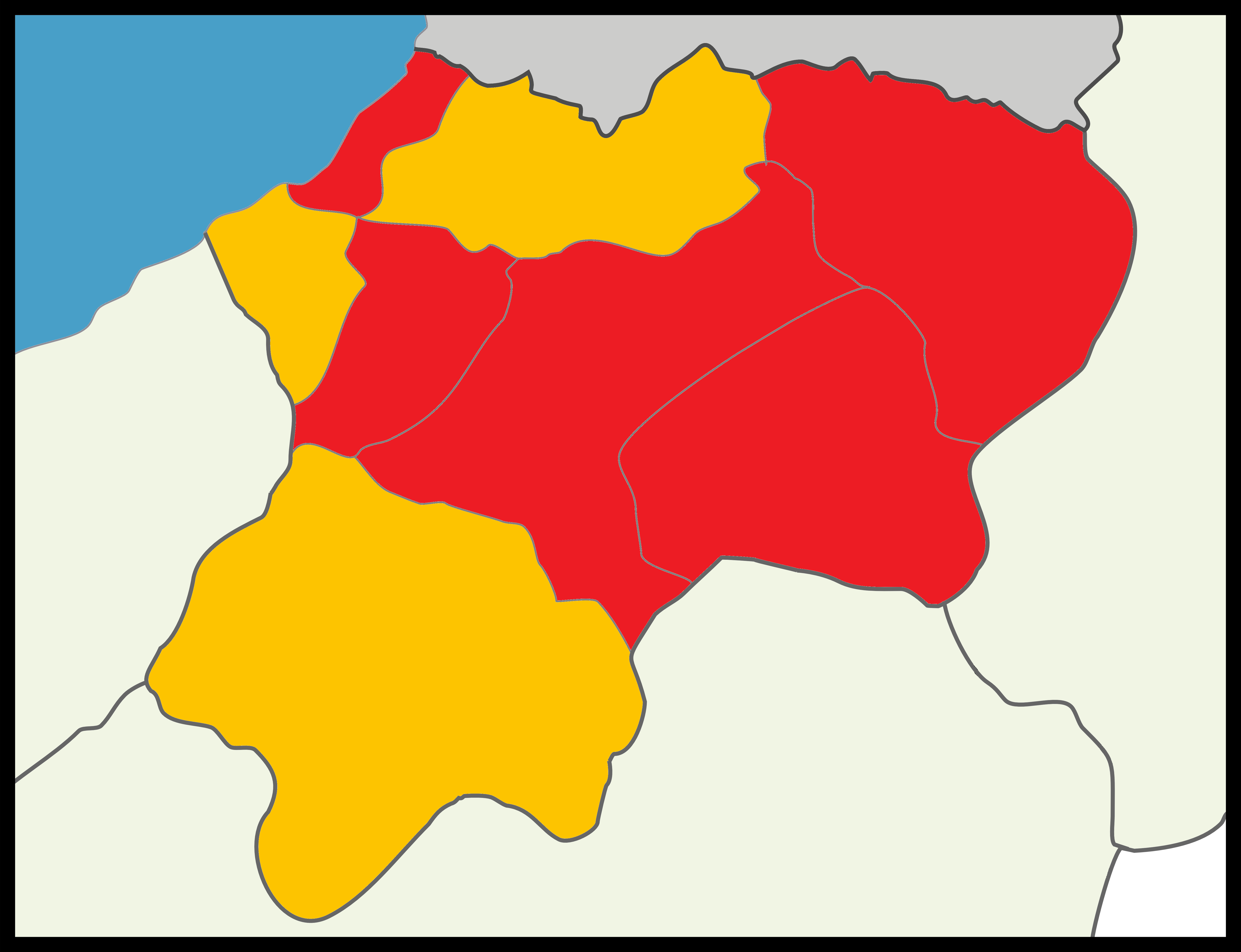 Artvin'de 2014 Türkiye cumhurbaşkanlığı seçimi sonuçları